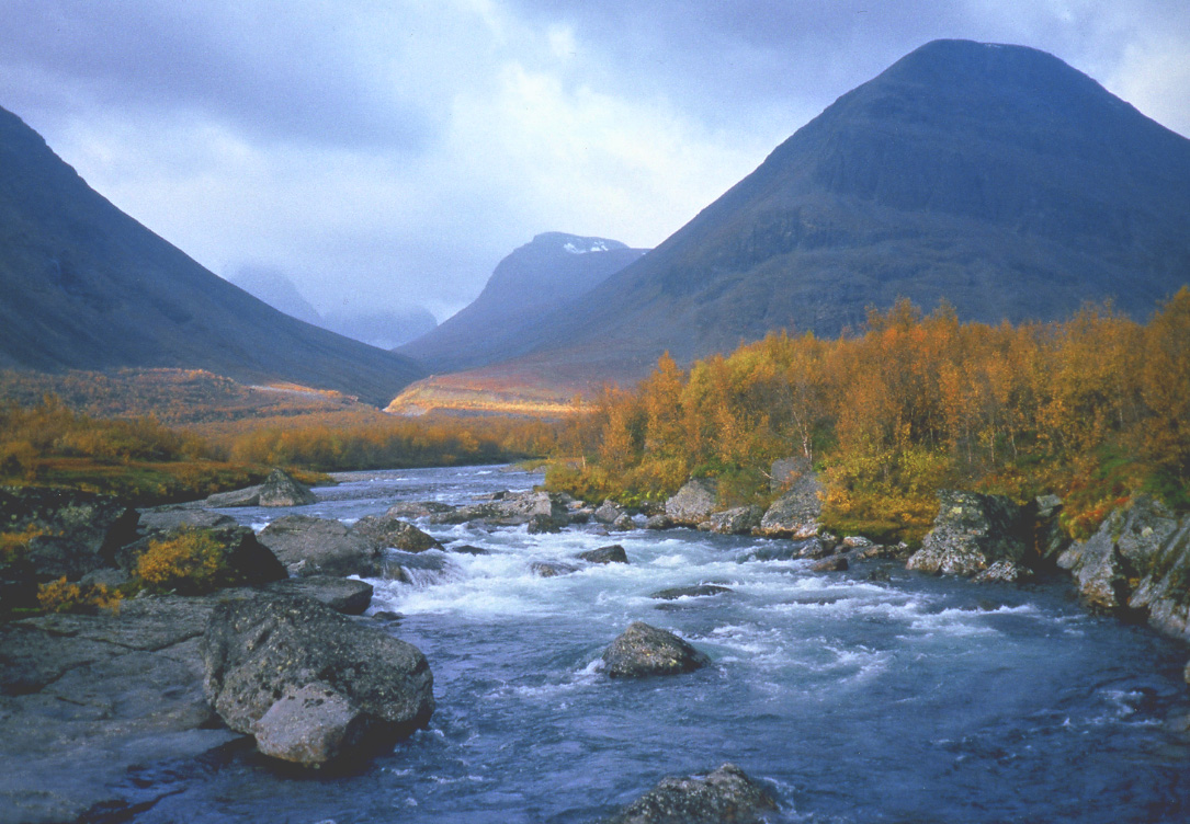 Das Tal Vistasvagge unterhalb des Kebnekaise-Massivs in schwedisch Lappland